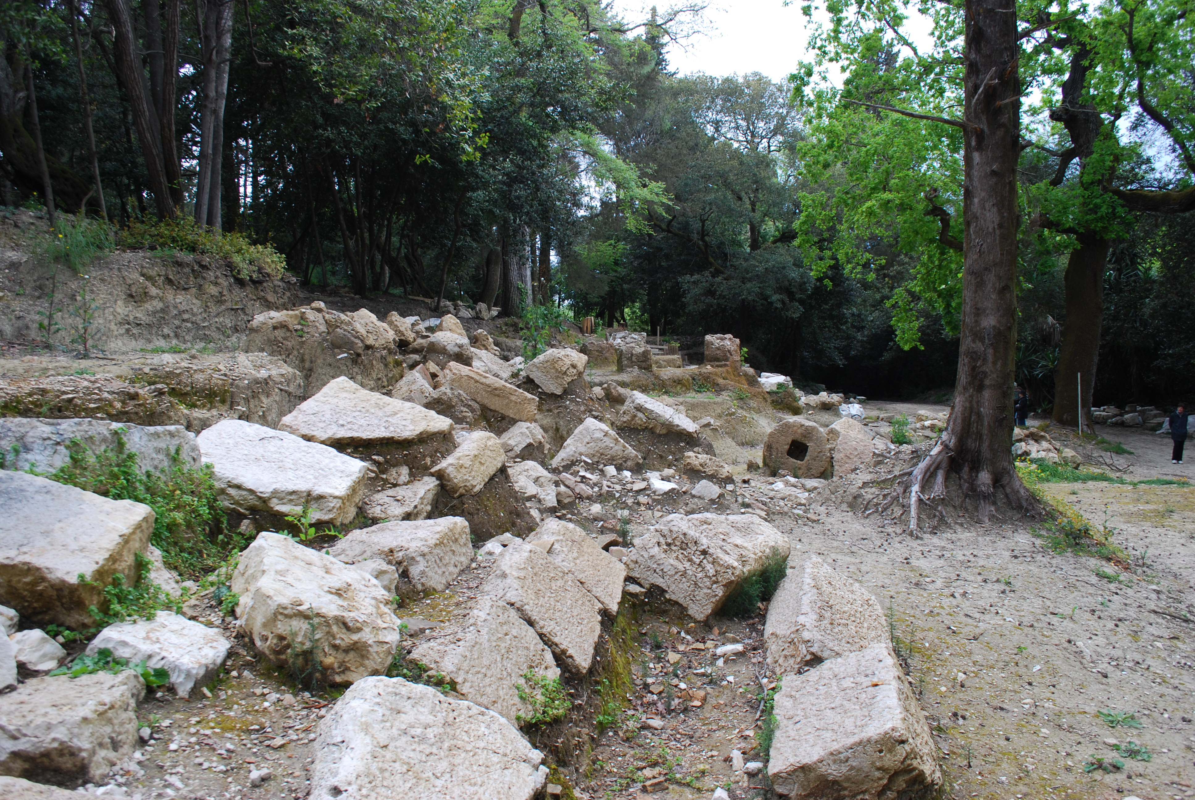 Vue du site archéologique de Paleopoli à Corfou.